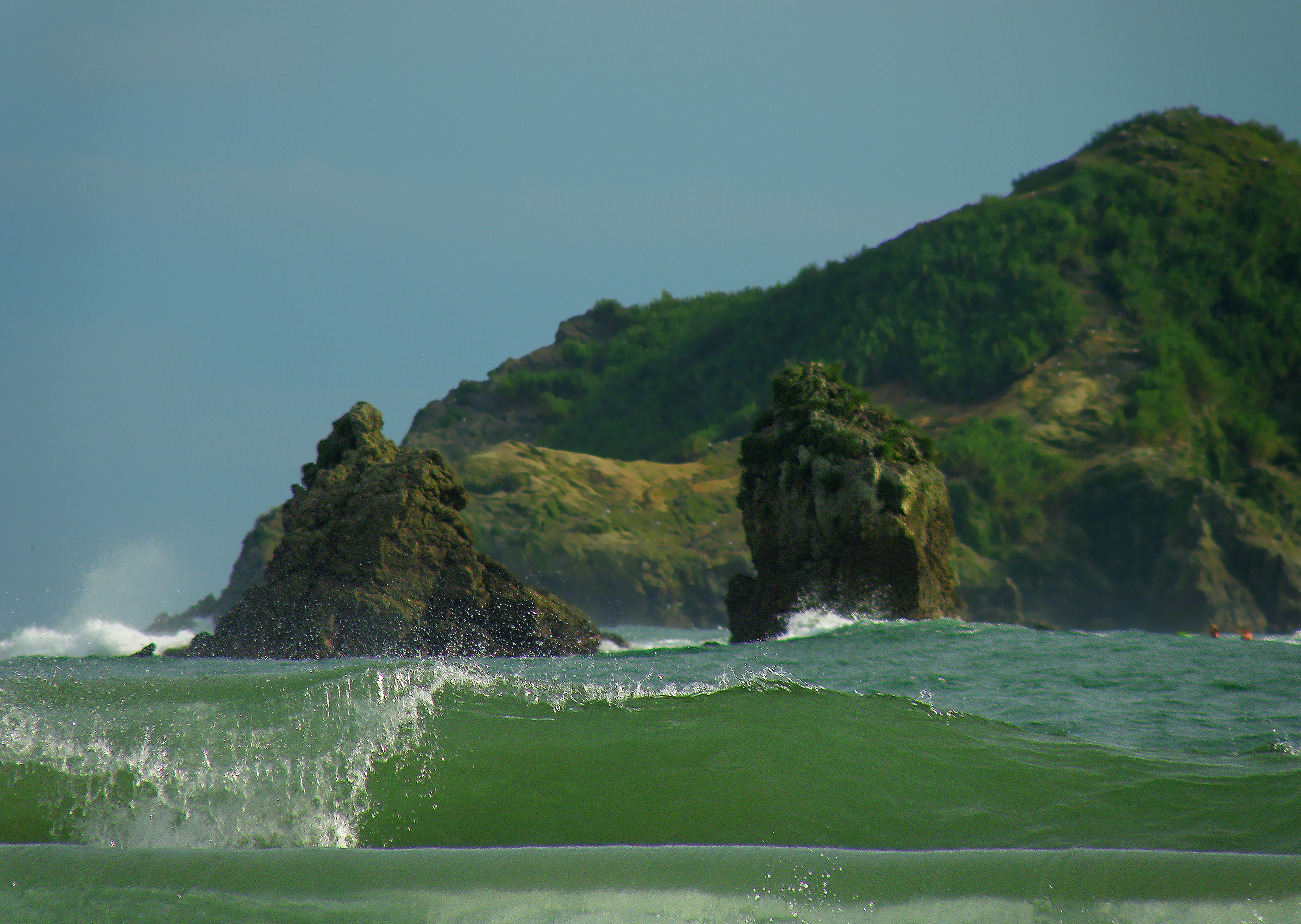 Manuel Antonio Beach, Costa Rica.